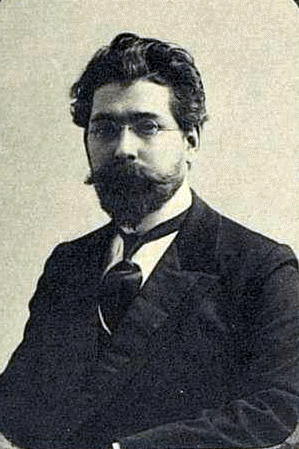 Иван Васильевич Титов (Иоанн; 18 февраля 1879, Пермская губерния — 18 октября 1948, Париж) — священник, депутат III и IV Государственных Дум от Пермской губернии (1907—1917), кандидат в делегаты Учредительного собрания (1917).